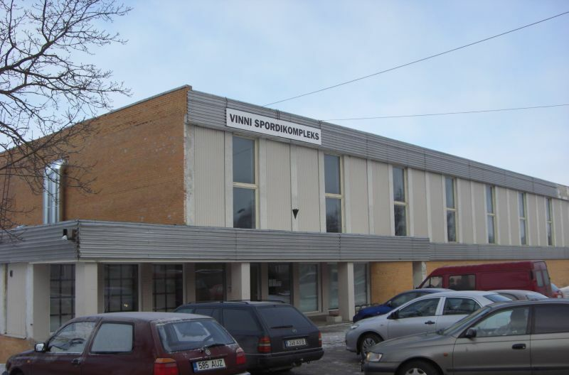 Vinni spordikompleks